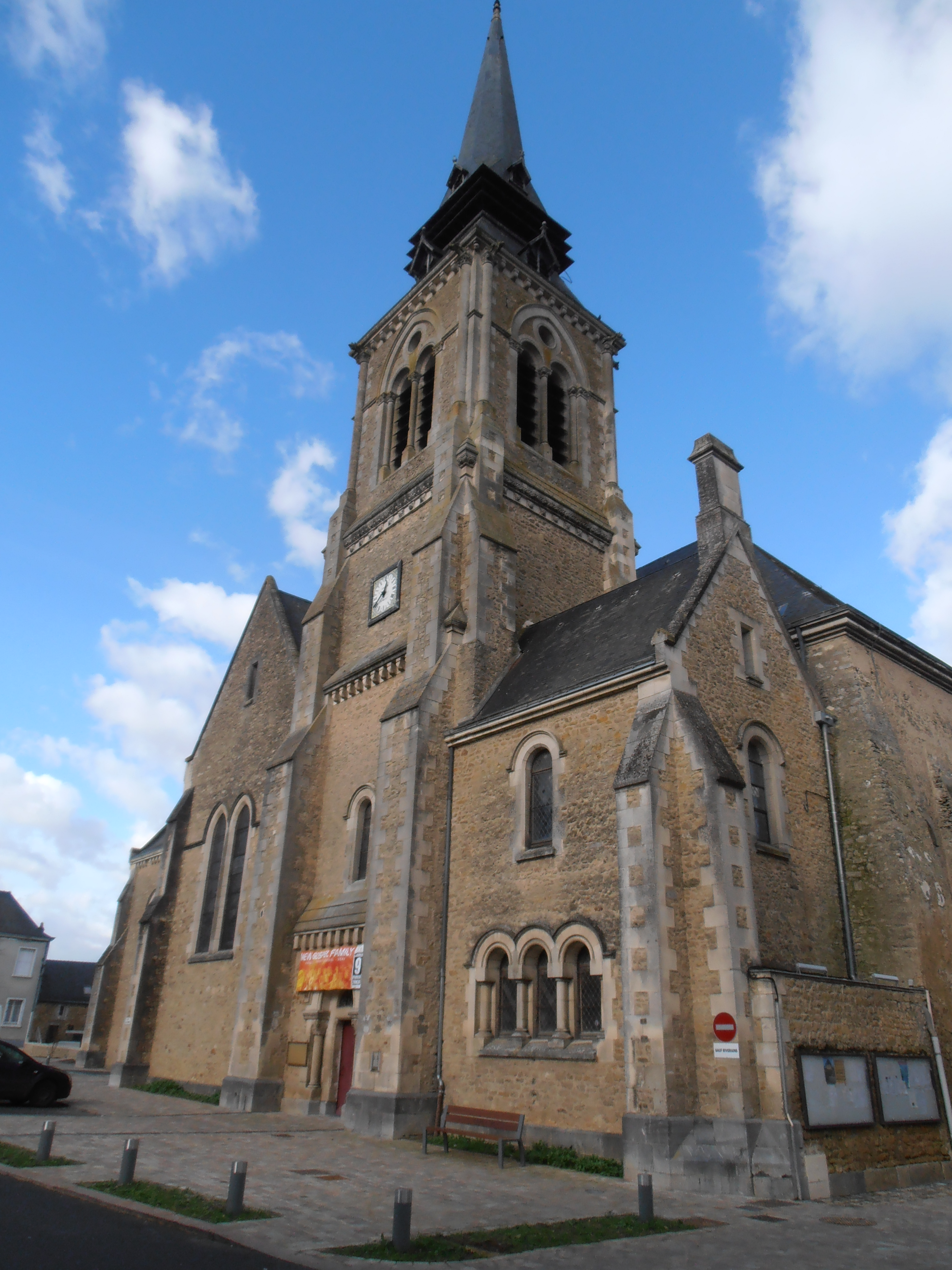 L'église St Pierre dans le bourg de Précigné.